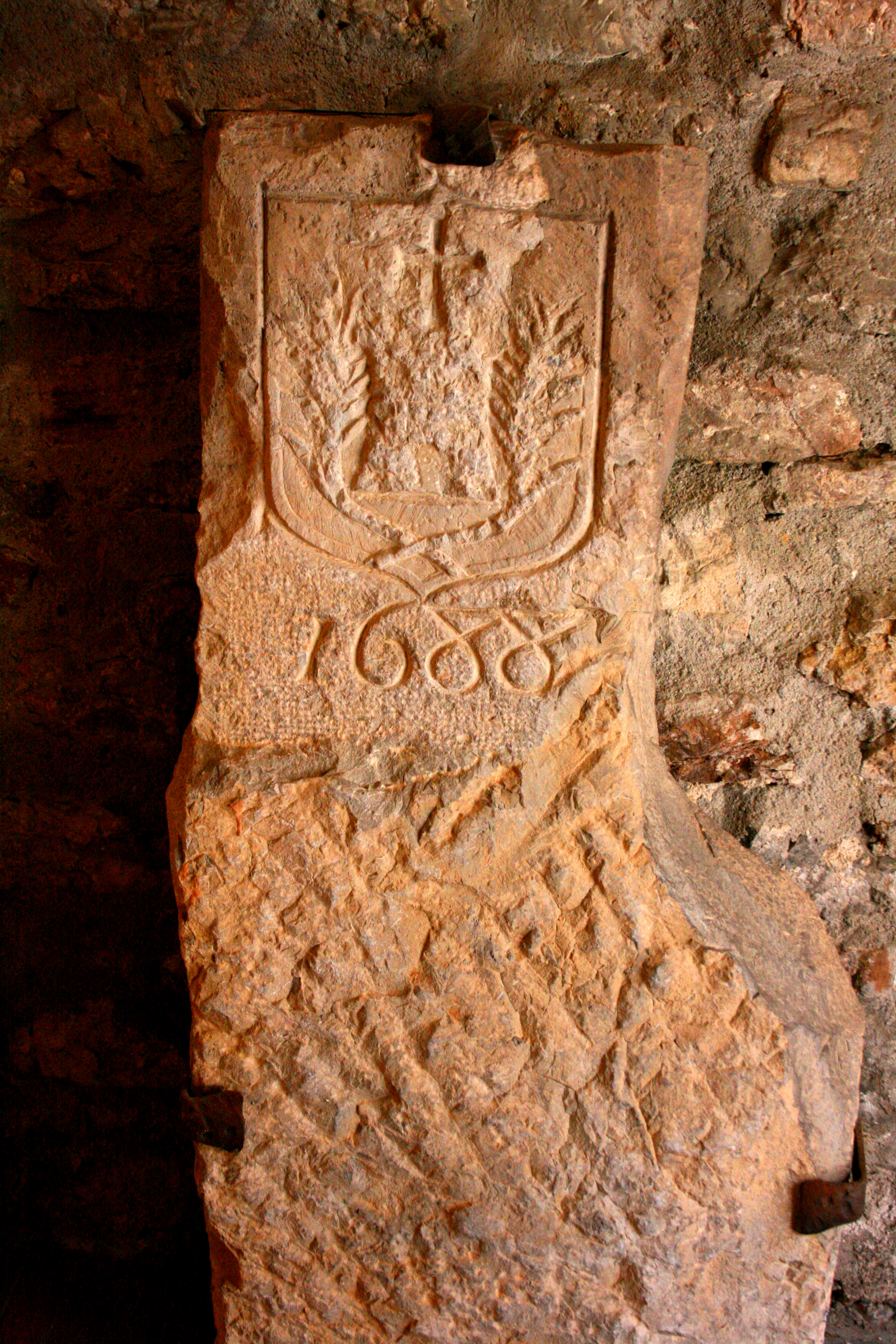 "terme" de séparation d'illioules et de Saint-nazaire, mis en place par des experts venus d'Aix-en-provence en septembre 1688. Il porte les armoiries de sanary/ Conservé dans la Tour romane de Sanary